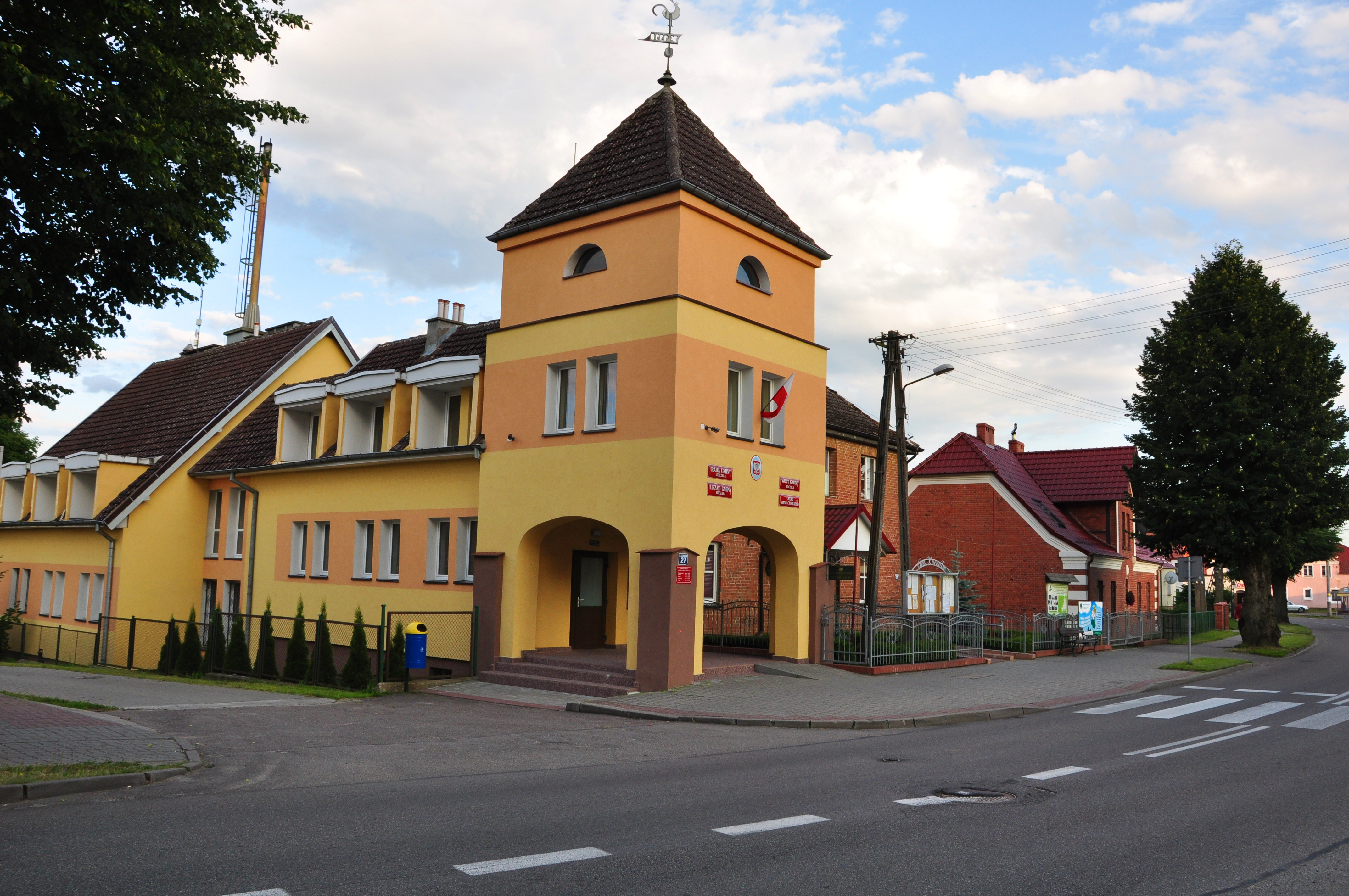 Urząd Gminy Koczała 77-220 Koczała